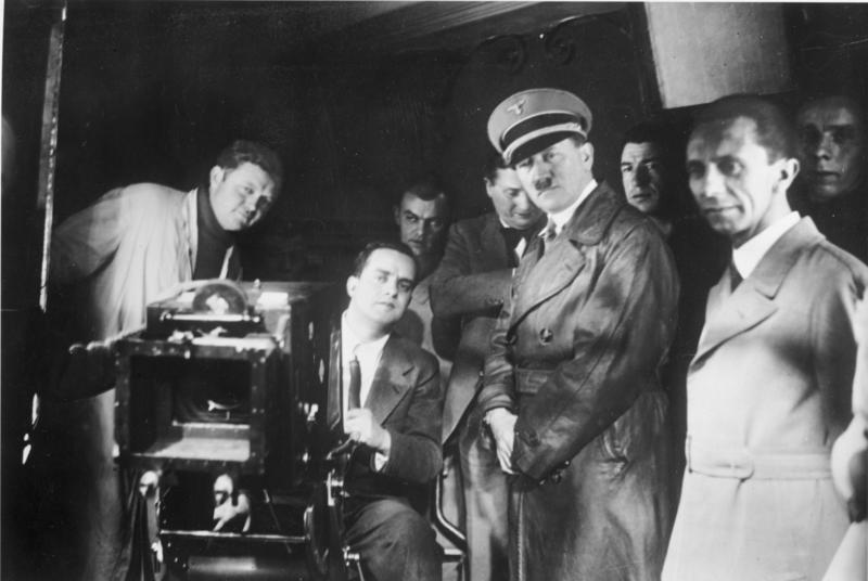 Besuch von Hitler und Goebbels bei der UFA Der Führer bei der Ufa. Der Führer und Reichskanzler stattete am 4. Januar in Begleitung des Reichspropagandaministers den Neubabelsberger Ateliers der Ufa einen Besuch ab und nahm dabei Gelegenheit, die Bauten des neuen Films "Barcarole" zu besichtigen. Generaldirektor Klitzsch führte den Reichskanzler und Minister Dr. Goebbels durch den Betrieb. Viel Interesse fand der soeben von der Ufa auf Anregung von Dr. Todt fertiggestellte Reichsautobahn-Film "Strasse ohne Hindernisse". UBz: den Führer und Dr. Goebbels während der Besichtigung der Ateliers, links Produktionsleiter Stapenhorst. Abgebildete Personen: Stapenhorst, Günther: Filmproduzent (GND 117212717) Hitler, Adolf: Reichskanzler, Deutschland Goebbels, Joseph: Reichsminister für Volksaufklärung und Propaganda, Gauleiter Berlin, Deutschland